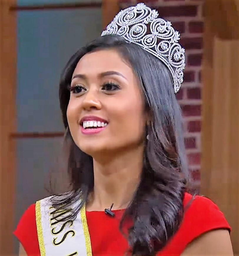 The Best of Ini Talkshow - Serunya Gisella, Maria Harfanti, dan Ricky Harun Bermain Tebak Gaya SUBSCRIBE Netmediatama Official Youtube Channel: Homepage : Twitter: Facebook Fan Page: NET. sudah tayang di ratusan kota di Indonesia. Cari daftar kotanya di Video Tutorial mencari UHF NET